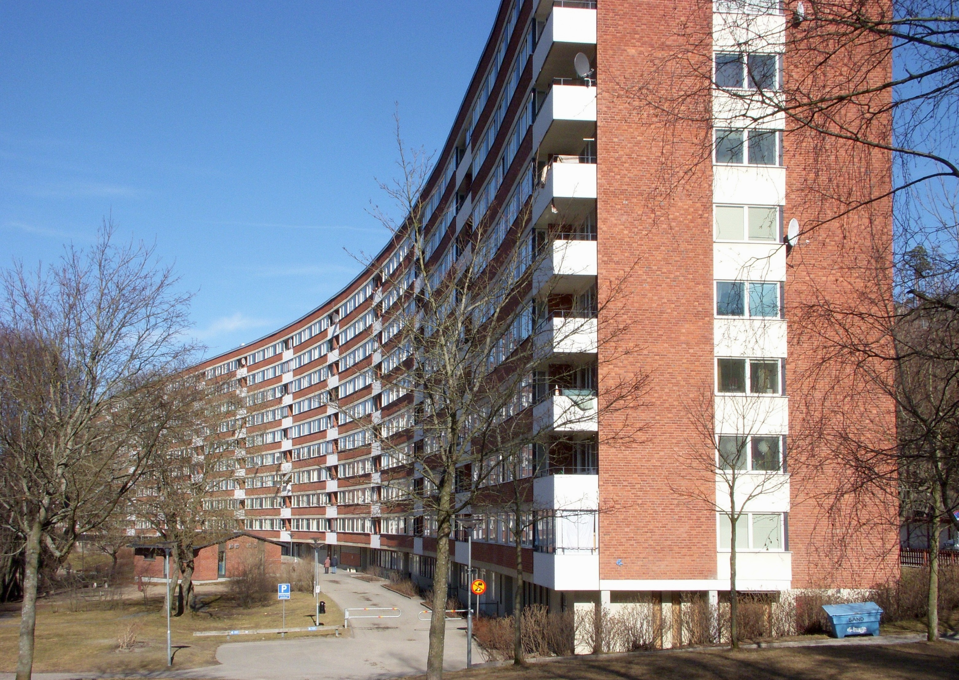 Bostadshus "Ormen Långe", Masmo